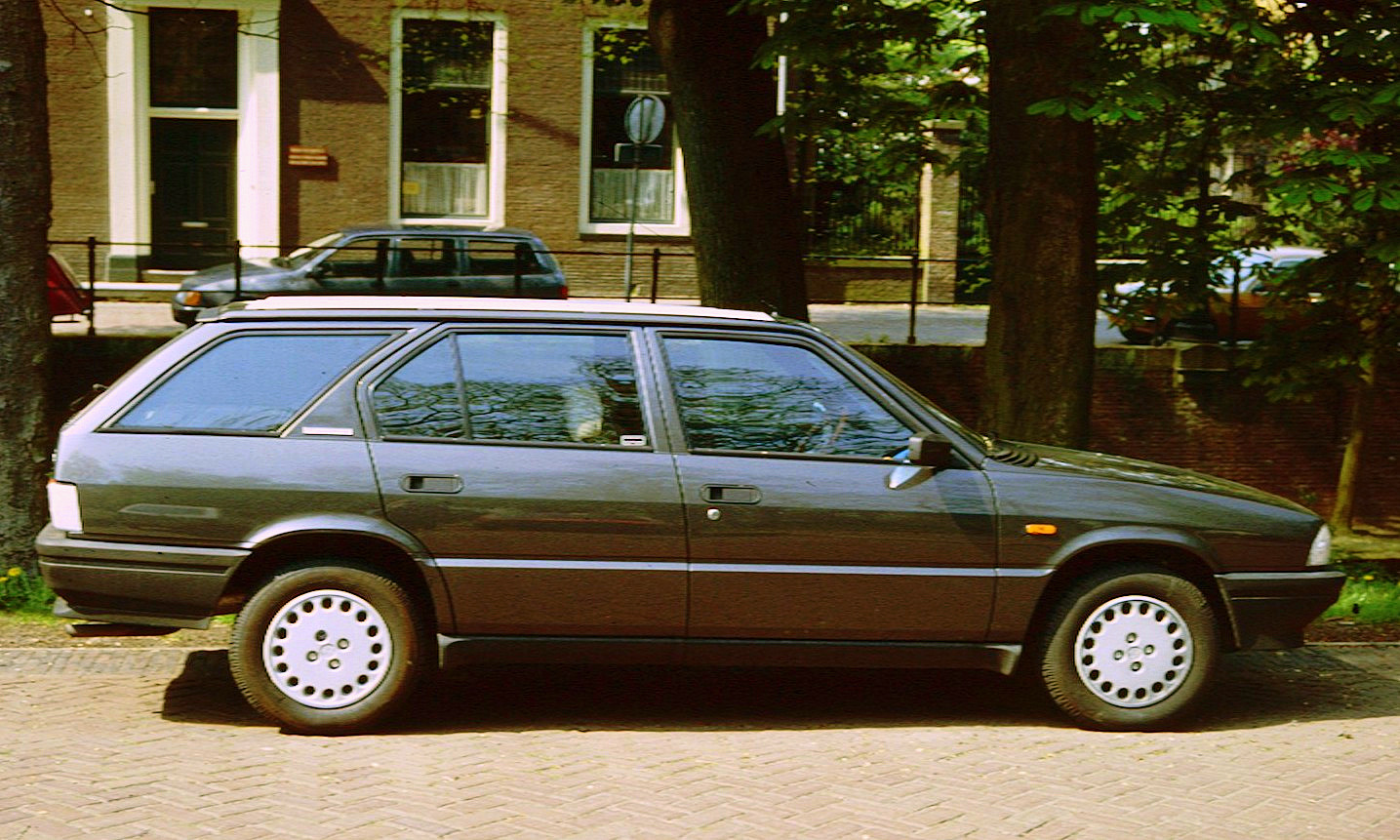 Alfa Romeo 33 in profile